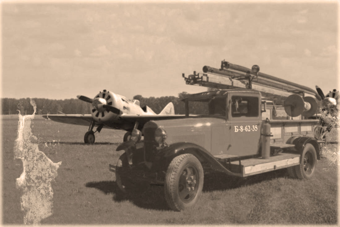 ГАЗ-АА ПМГ-1 На заднем плане - И-16